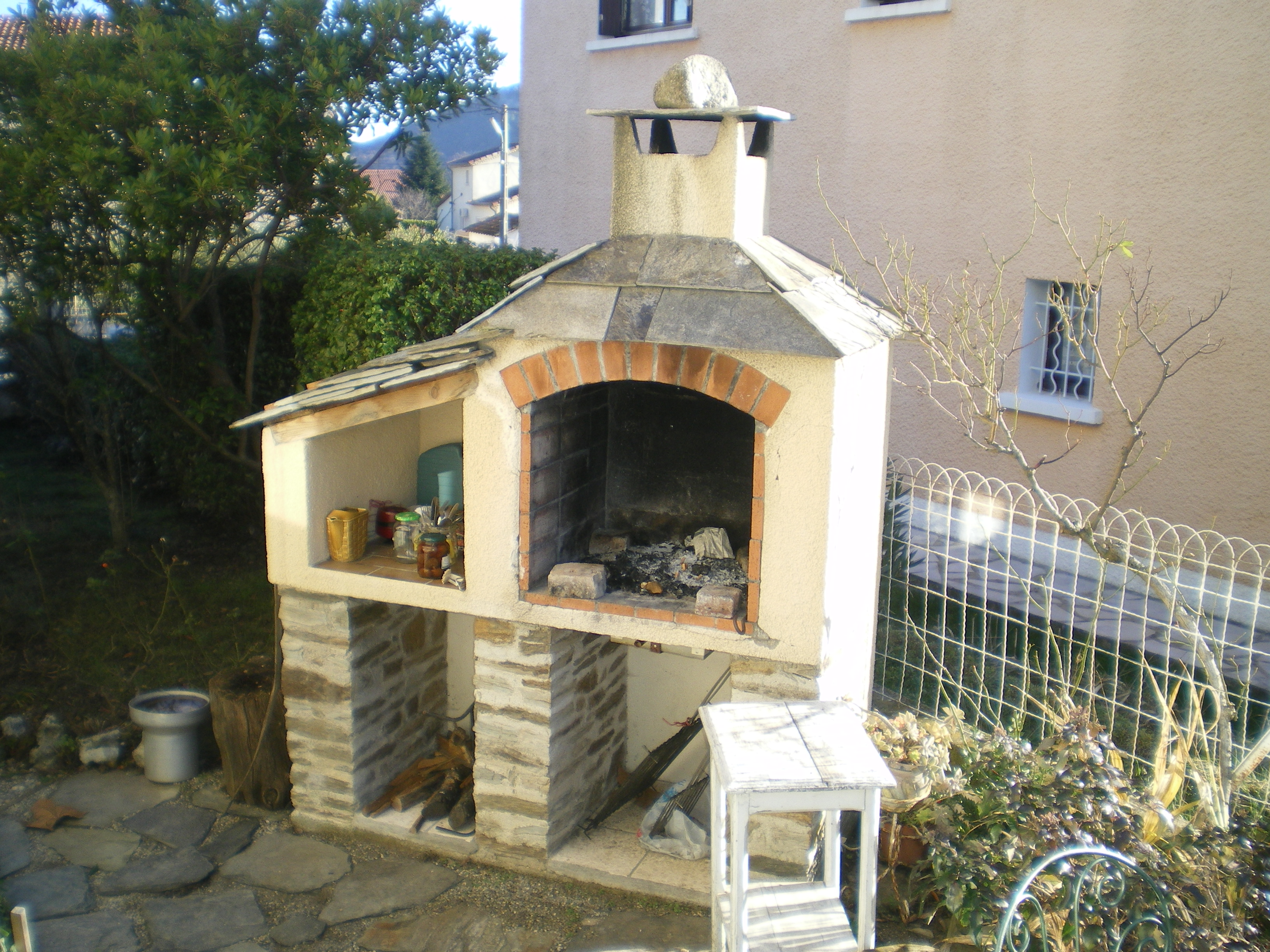 Barbecue dans les Cévennes